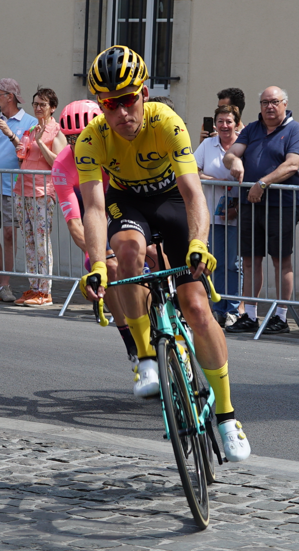 entré place Luçon lors du passage de la troisième étape à Reims.